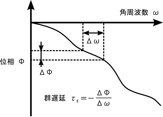 群遅延の説明。Agilent AN1287-1 p.11を参考に作成。